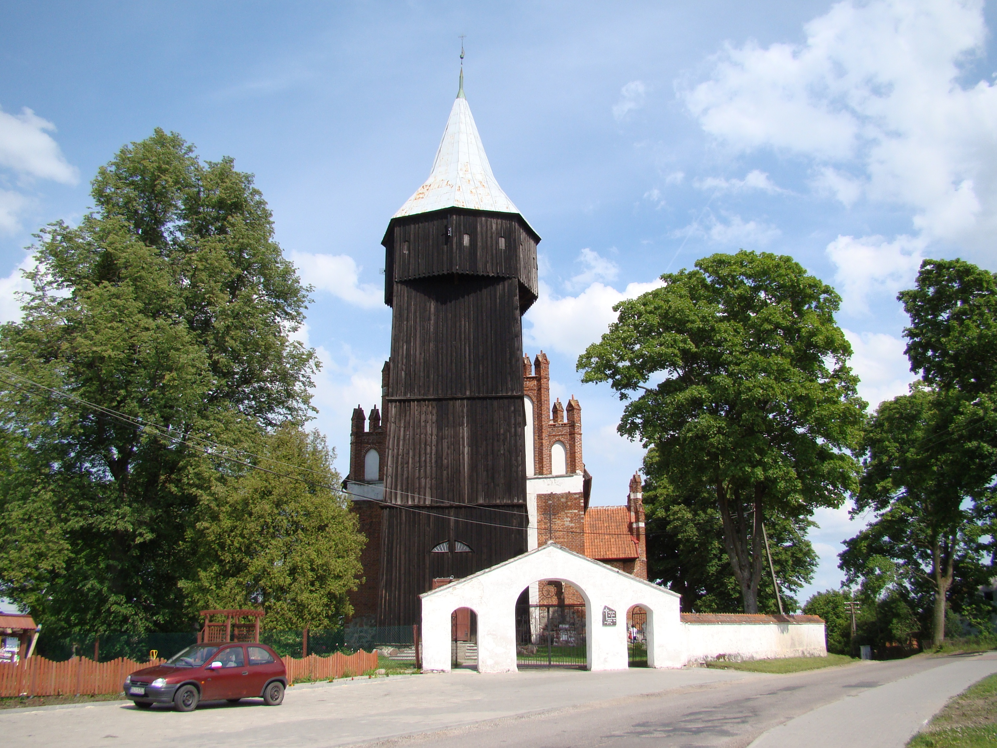 Kościół parafialny p.w.św.Jerzego gm.Jeziorany woj.warmińsko-mazurskie nr. NID 670 z 7.10.1967